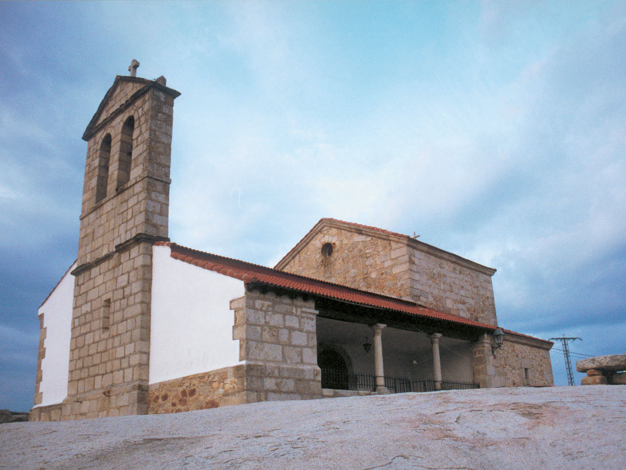 Vista lateral de iglesia en Sieteiglesias.